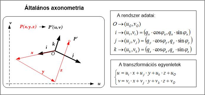 Az axonometria leképezése